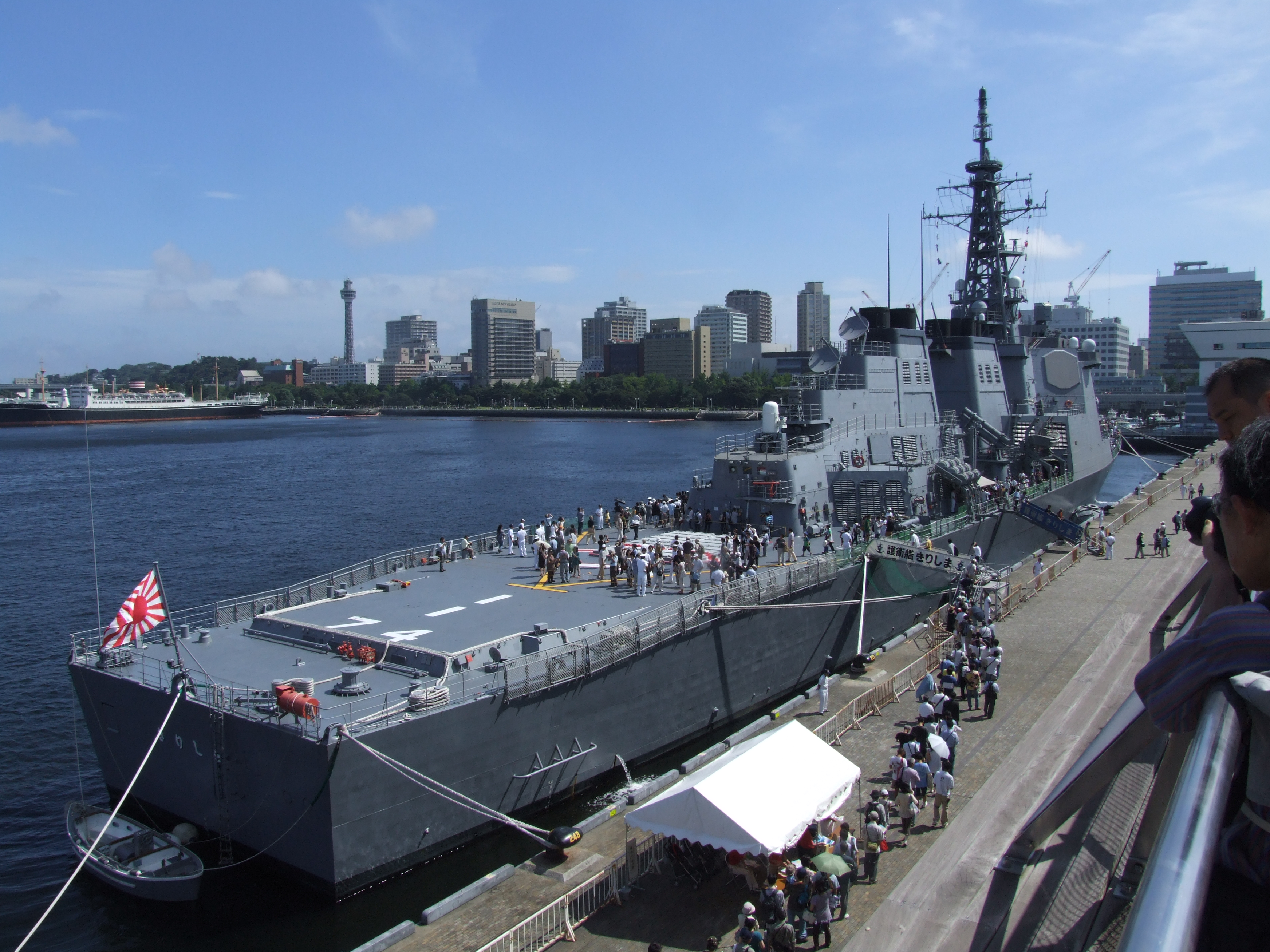 イージス艦きりしまの横浜港での一般公開（2009年7月25日撮影）